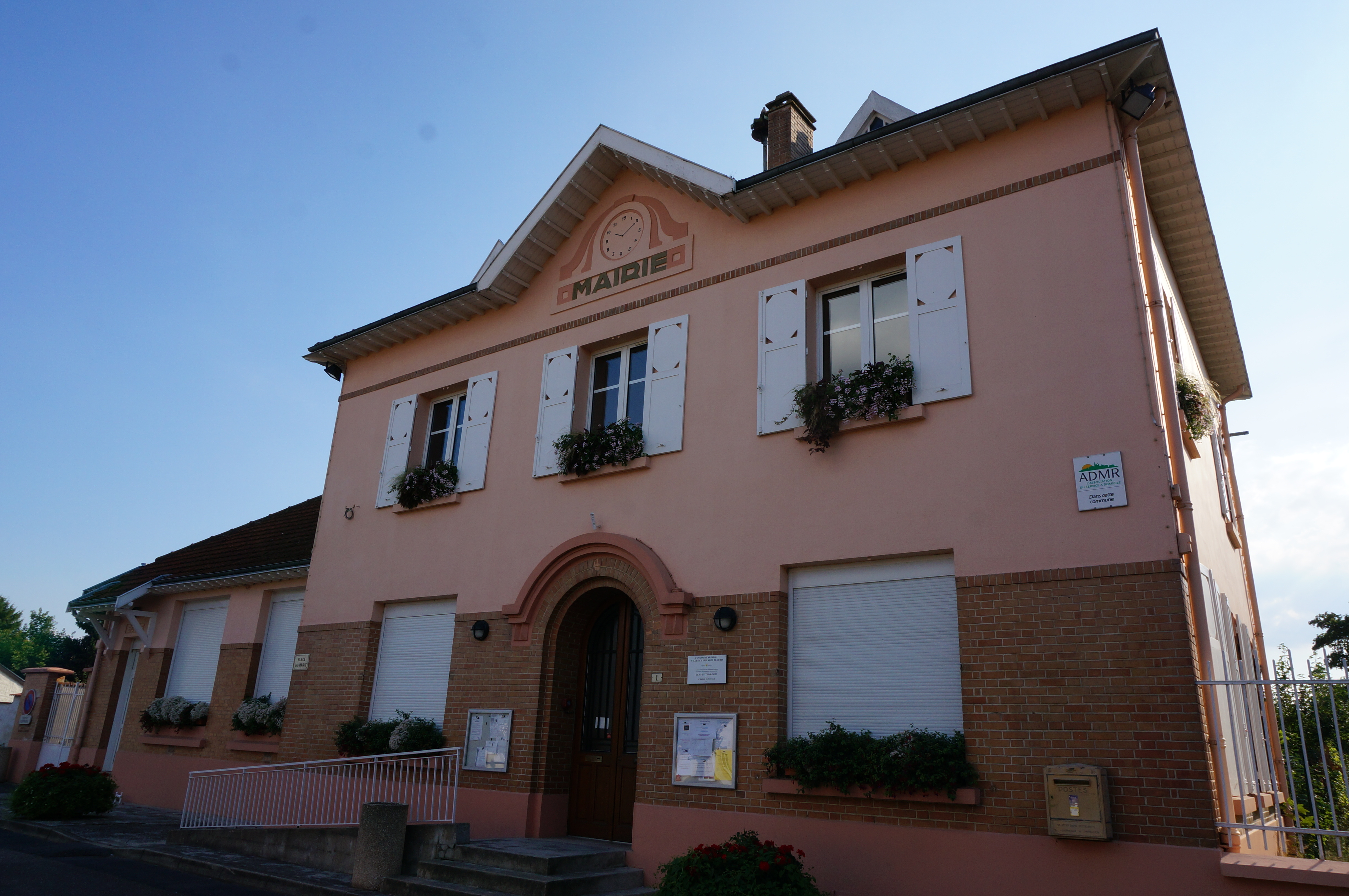 La Maire des Petites Loges .